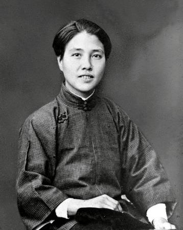 历史图片，版权已过期